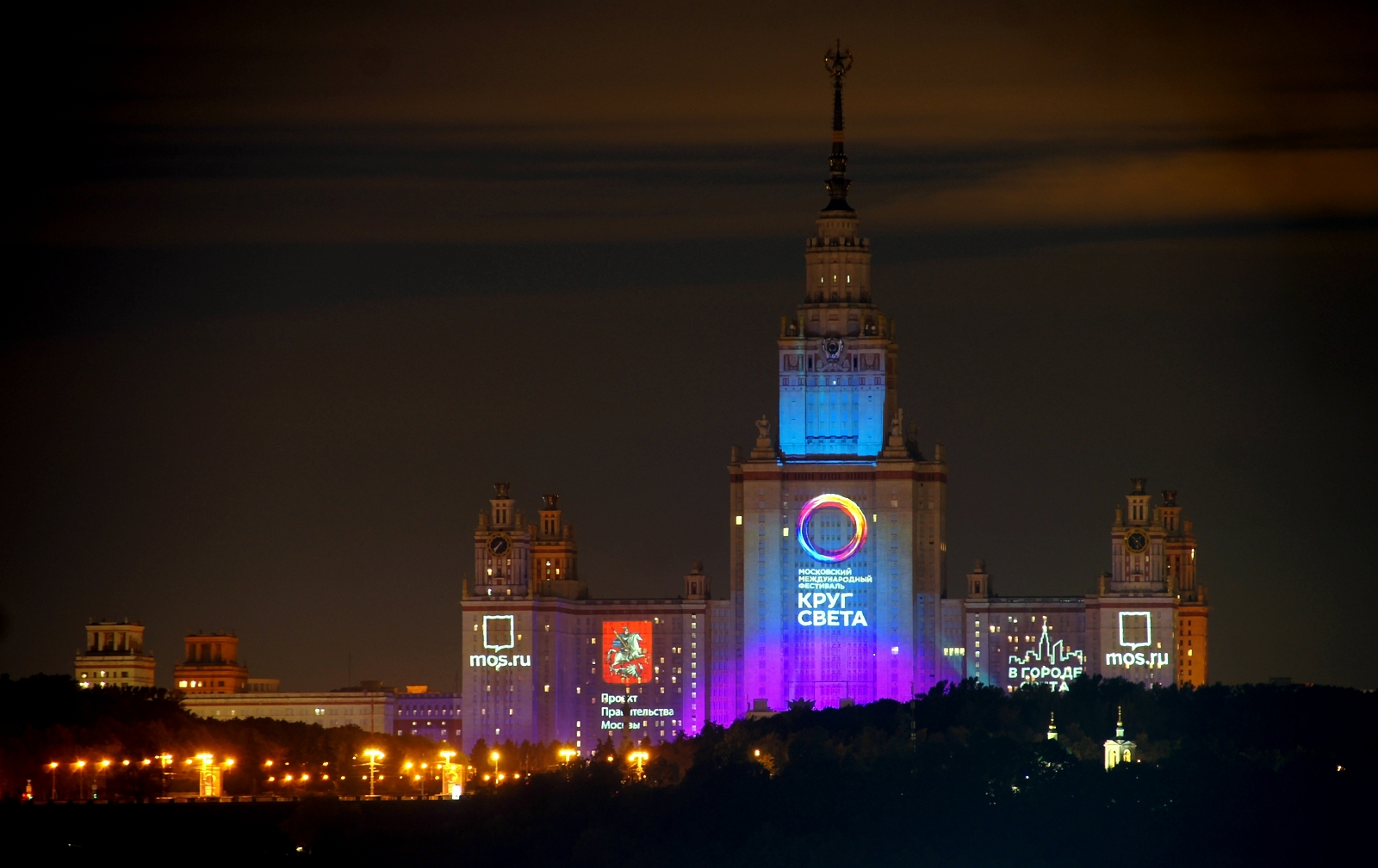 Круг света, 2016